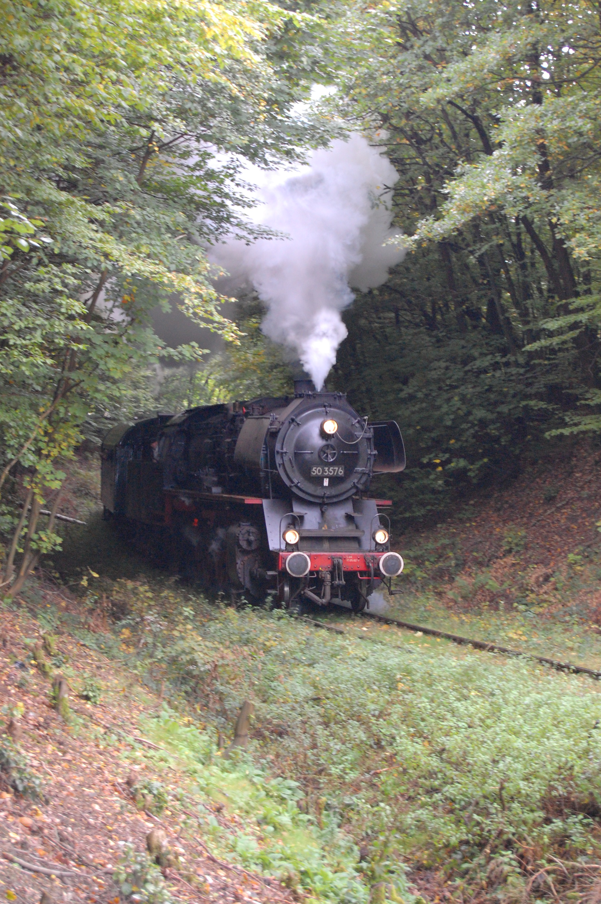 DR-Baureihe 50.35 der Nassauischen Touristik-Bahn auf der Aartalbahn bei Wiesbaden-Dotzheim